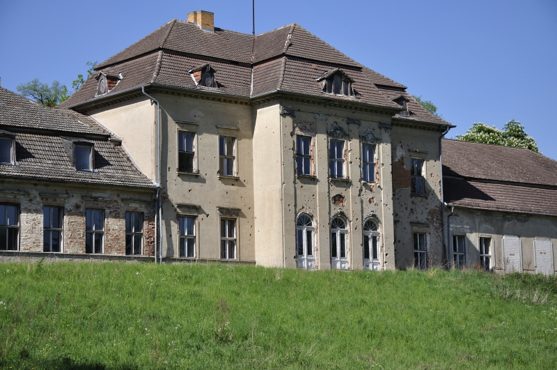 Schloss Prötzel von der Rückseite gesehen, Mai 2009.